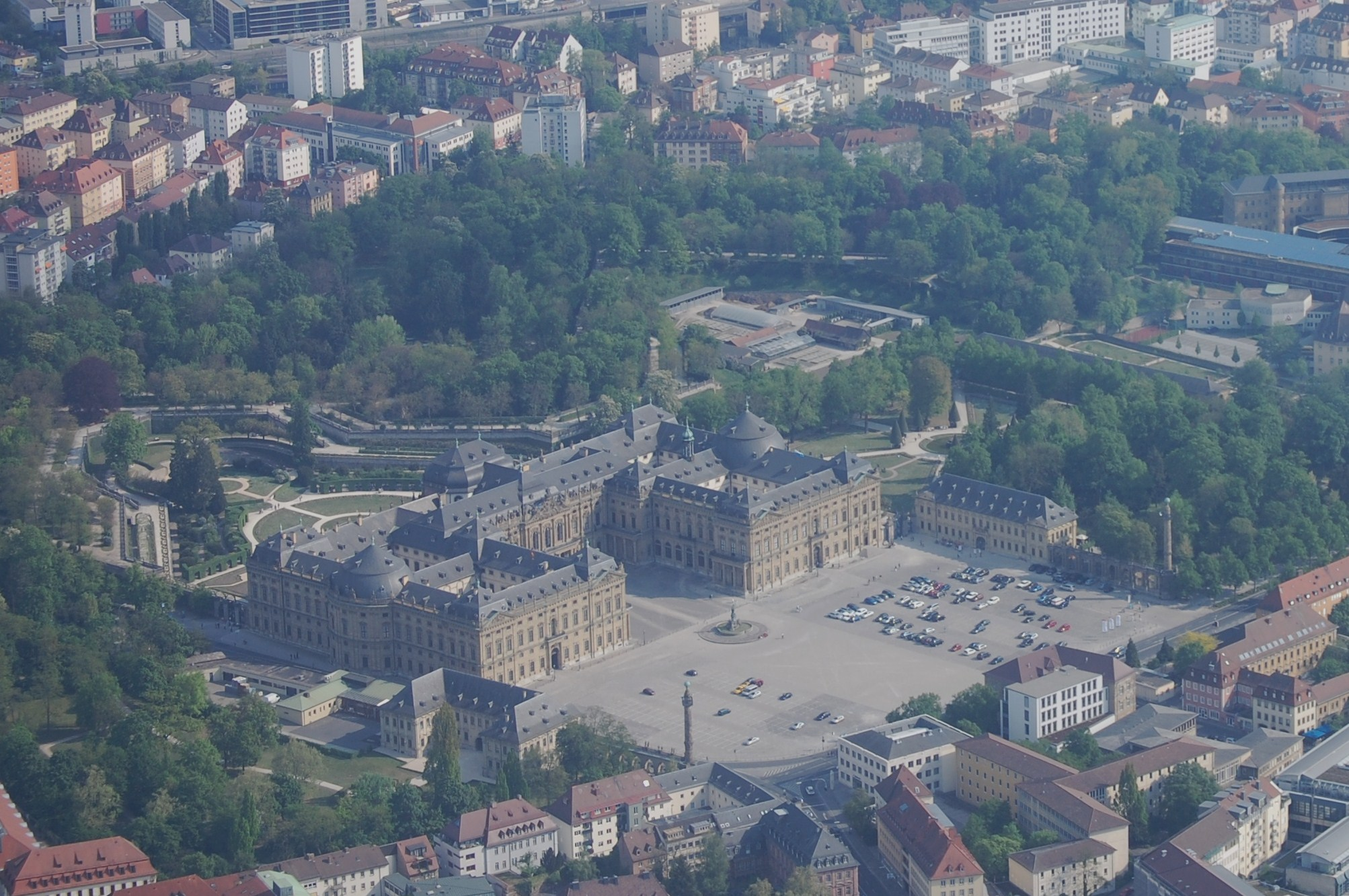 Residenz Würzburg